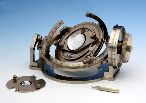 Universal-Drehtisch nach Berek zur Orientierung von Kristallen in Dünnschliffen für die Messung optischer Daten am Polarisationsmikroskop